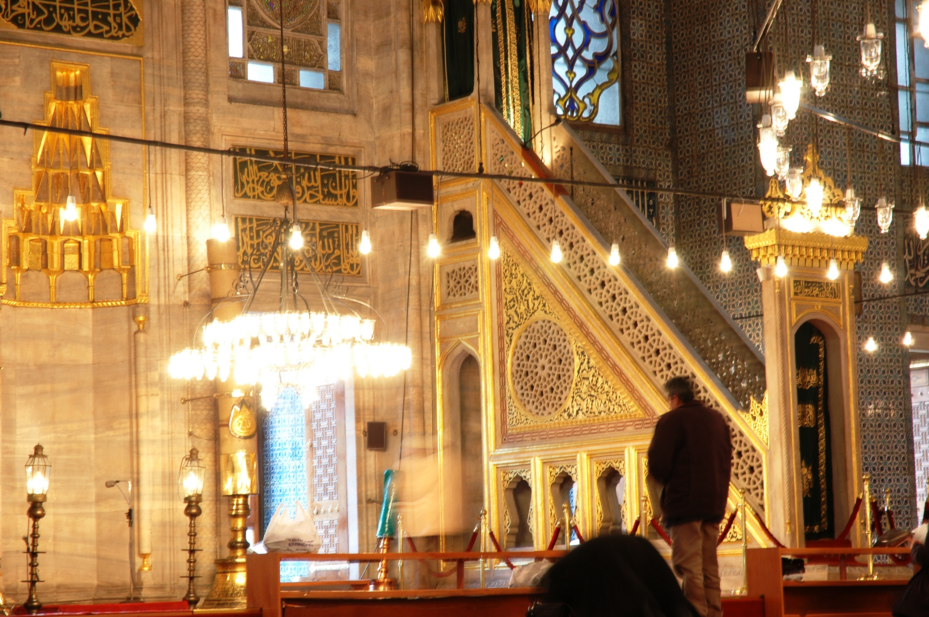 Istanbul - Mesquita Nova - Minbar